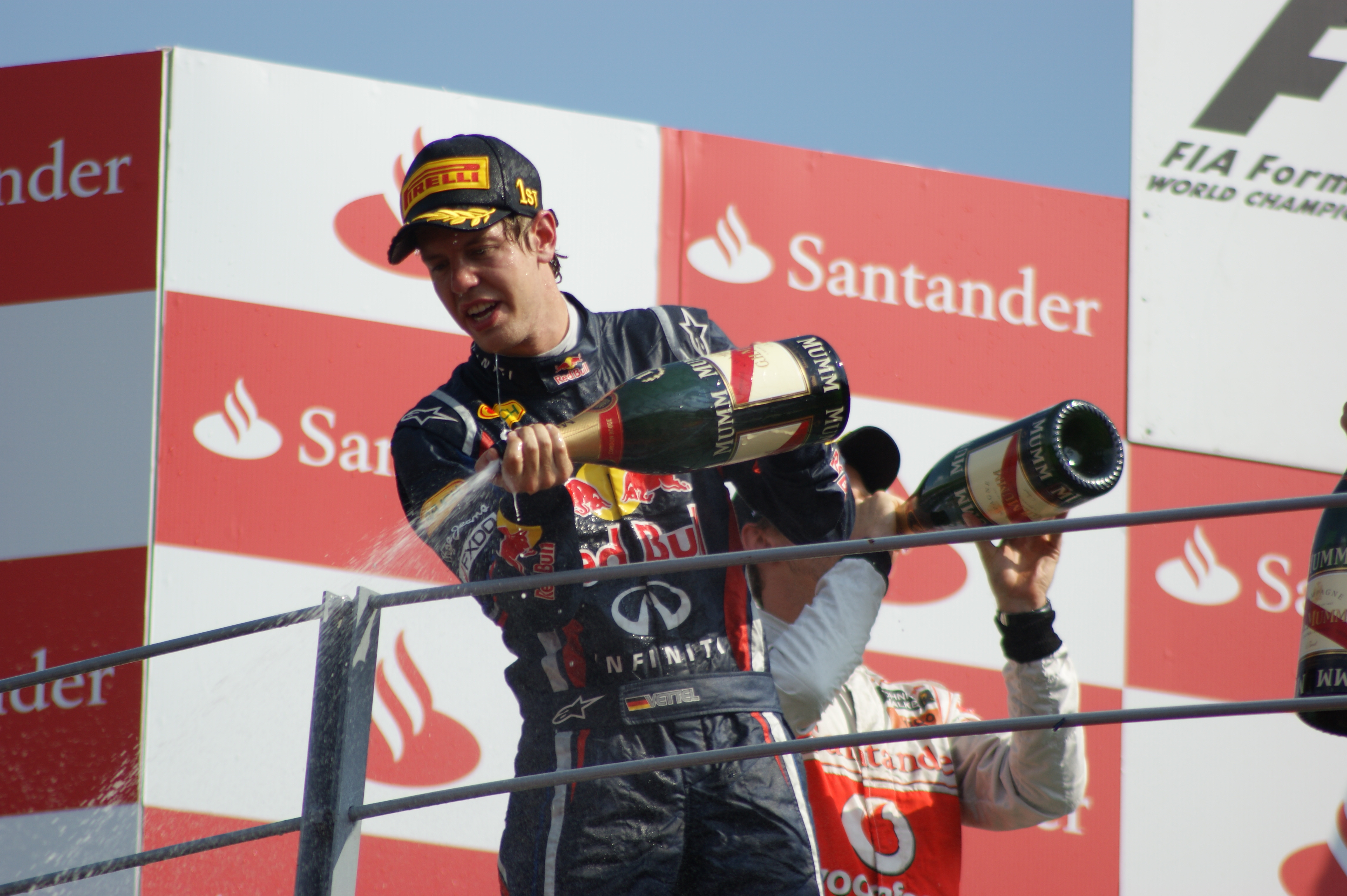 Sebastian Vettel sul podio di Monza 2011 visto dalla pista